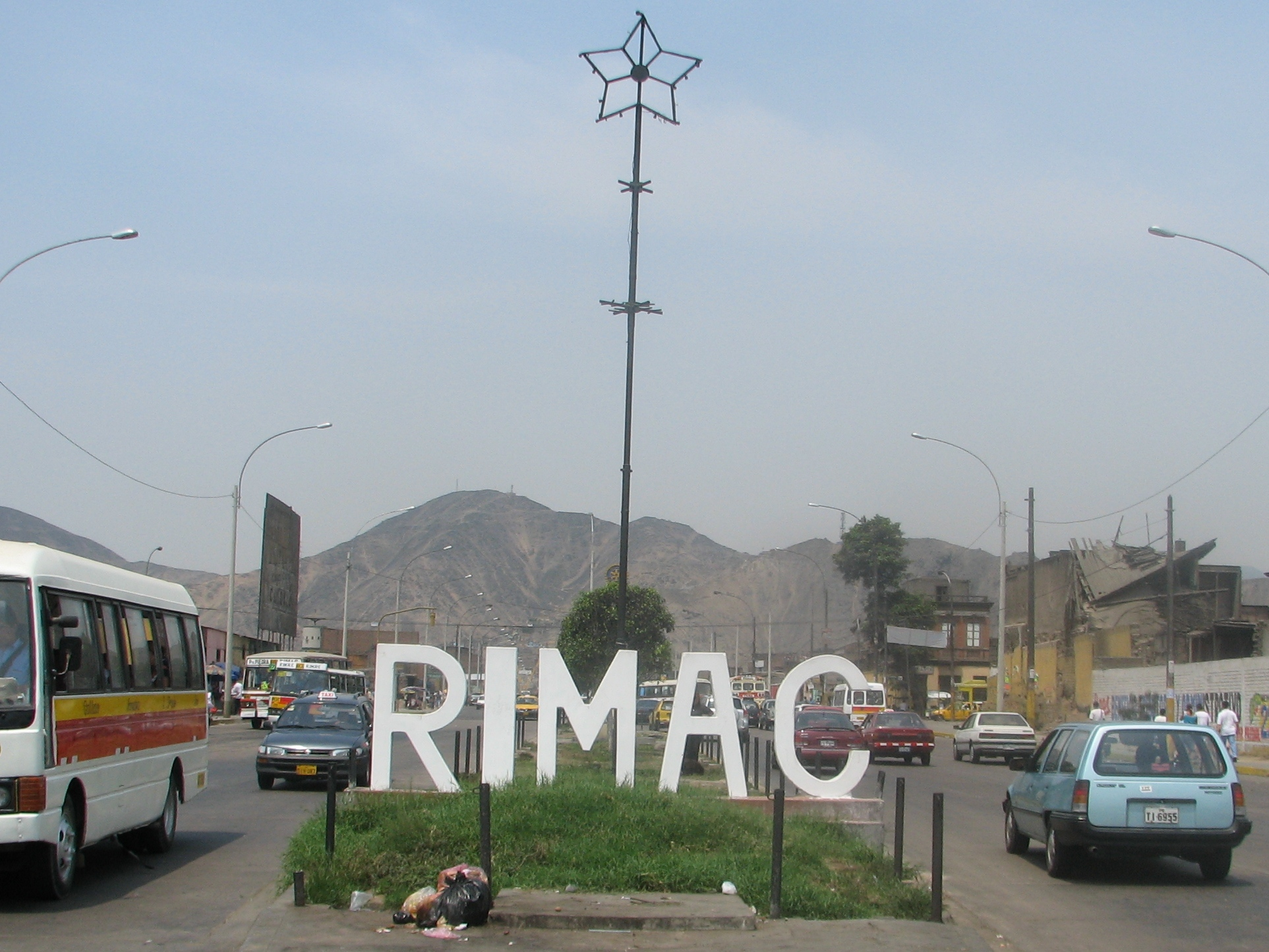 District sign Rímac district at Av. Prolongación Tacna in Rímac/Lima, Peru.